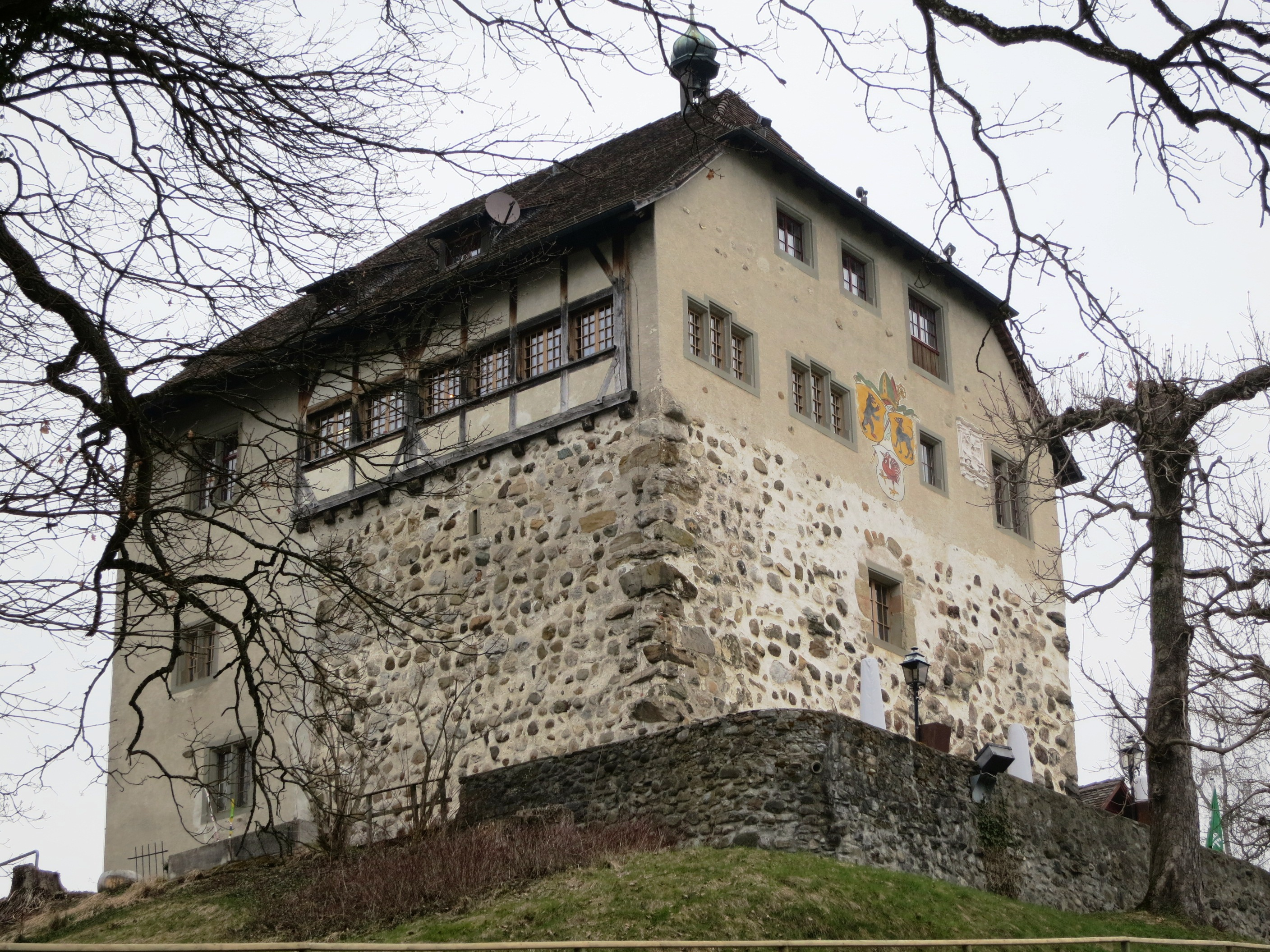 Schloss Oberberg, Gossau SG, Schweiz